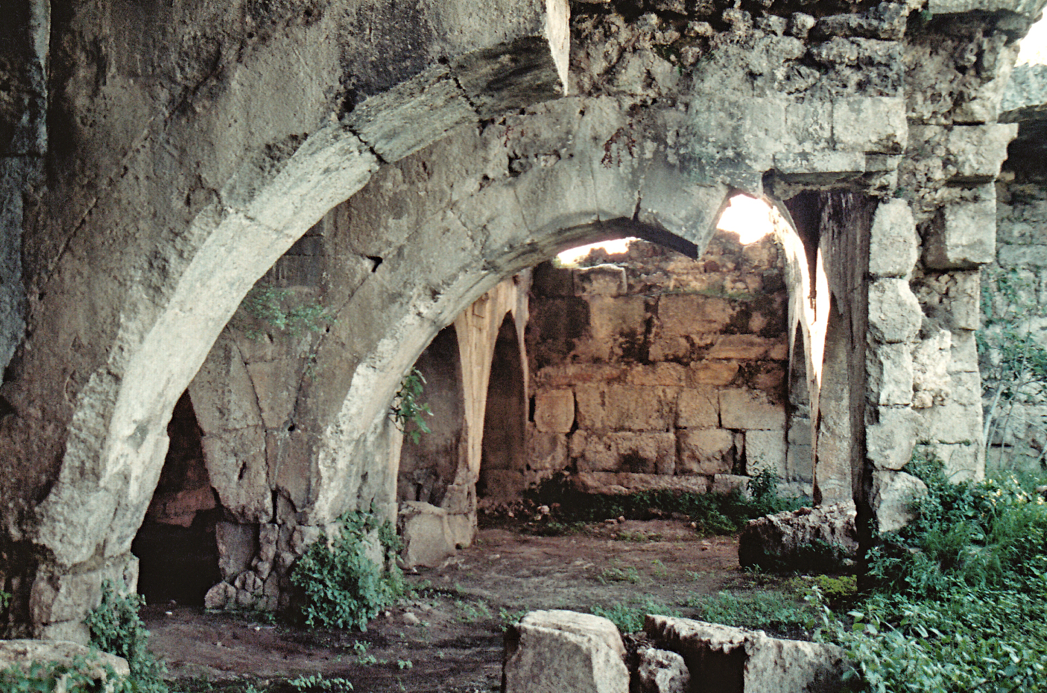 Evdir Han, Karawanserei nördlich Antalya, Südtürkei, Arkaden im Innenraum